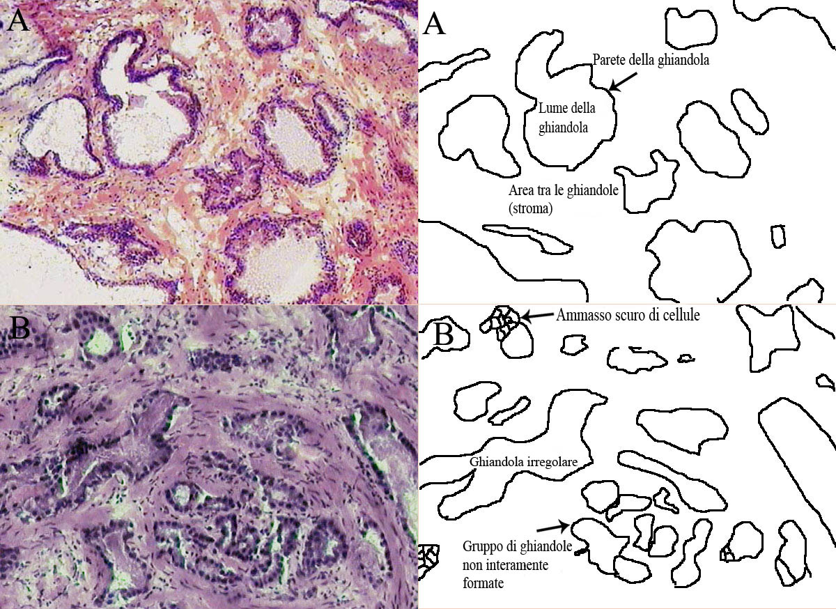 Tessuto della prostata normale (A) e con adenocarcinoma (B)